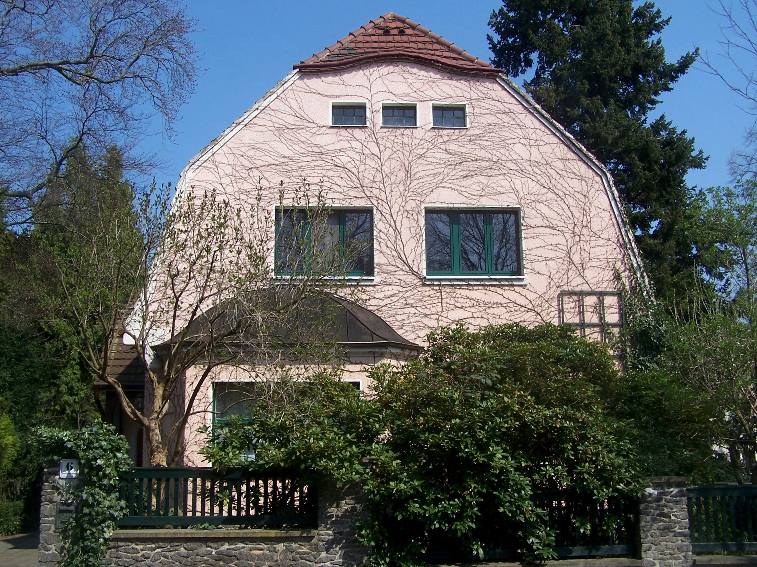 Landhaus Arno Faber, Freiligrathstr. 6 in Radebeul